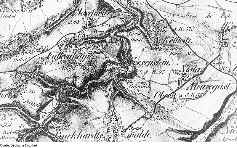 Original image description from the Deutsche Fotothek Müglitztal-Weesenstein. Oberreit, Sect. Dresden, 1821